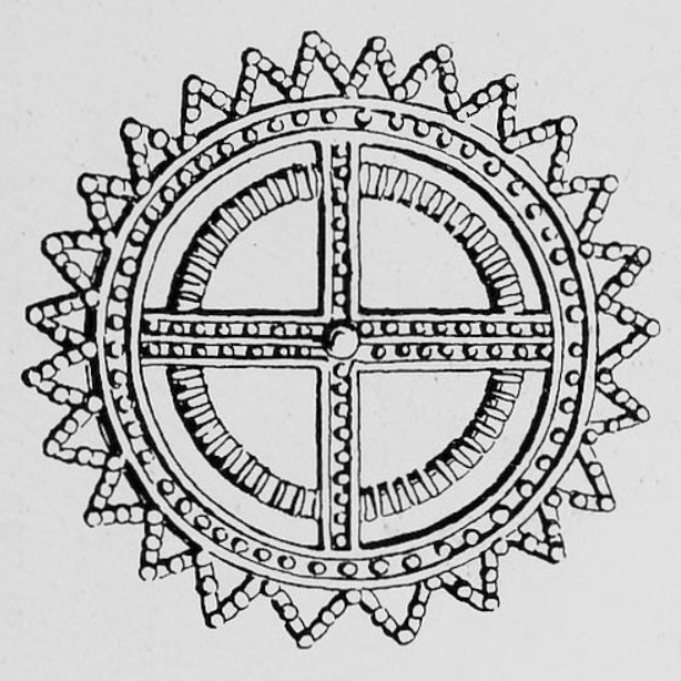 Zeichnung des Abdruckes einer Gussform aus Schiefer. Gefunden im Oktober 1899 nordwestlich des Ortes Palekastro.